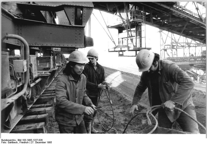 Espenhain, Gastarbeiter aus Vietnam ADN-ZB Gahlbeck 27.12.85-fre-Bez. Leipzig: Großtagebau sichert stabile Förderleistung – Mit einer guten Planerfüllung bis zum Jahresende sichern die Bergleute des Braunkohle-Großtagebaus Espenhain des Braunkohlewerkes Borna den guten Planstart 1986. Für den störungsfreien Betrieb sorgen u. a. die Kumpel von der B-Schicht an der Förderbrücke: V. l. n. r. Thuy Vuzban (aus der SRV), Jens Altwein und Rolf Bernhard